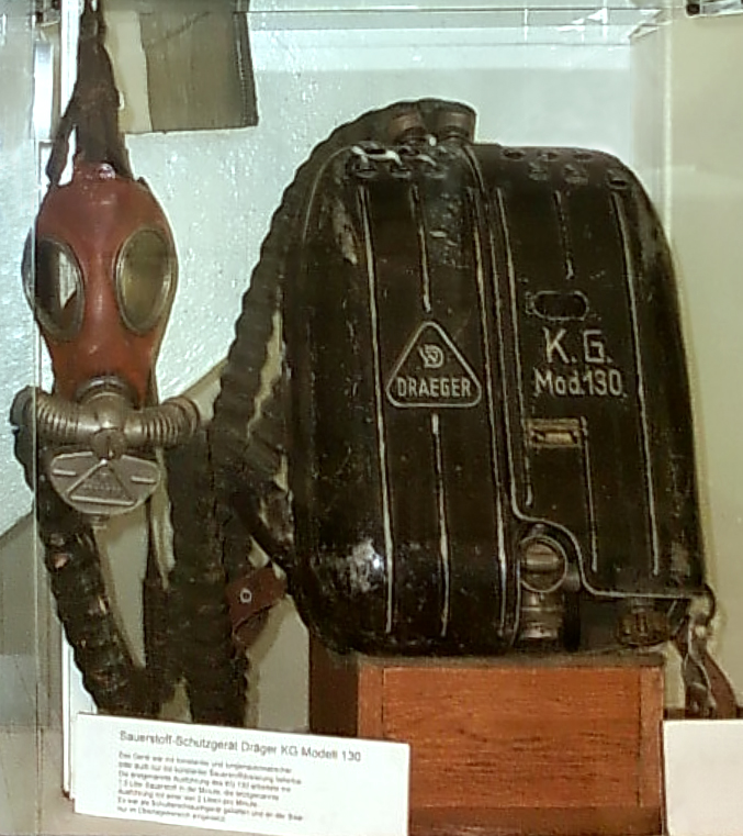 Sauerstoff-Schutzgerät Draeger K.G. Modell 130. Atemschutzgerät für den Bergbau.